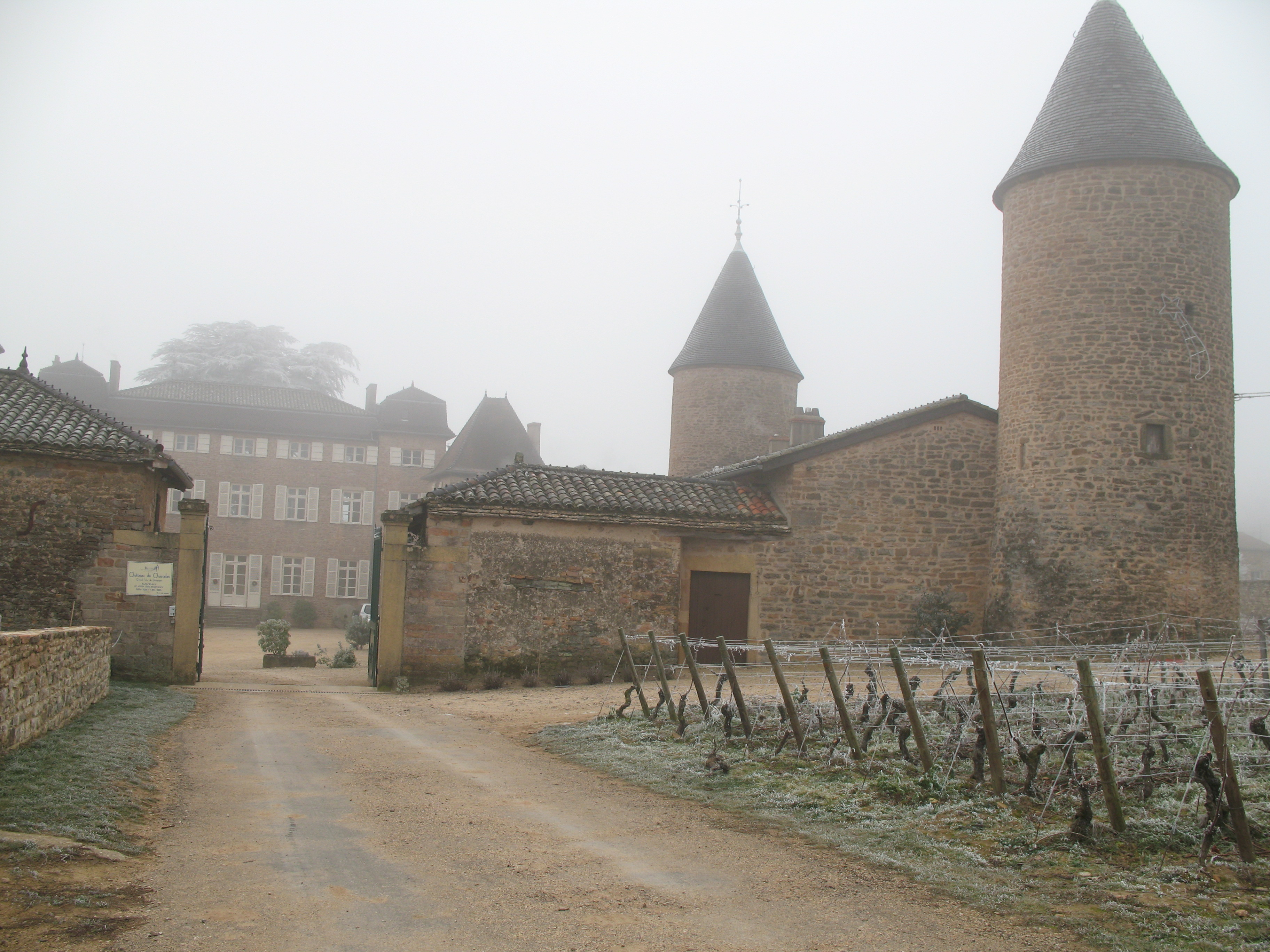 château de Chasselas (Saône-et-Loire)